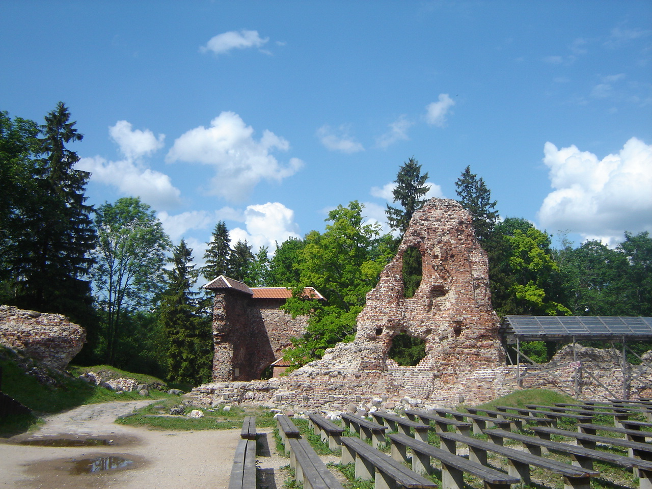 Linnuse värav